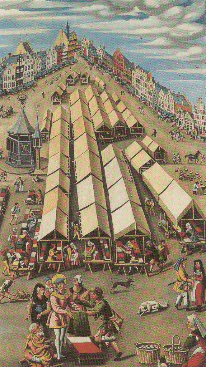 De Markt te 's-Hertogenbosch gezien vanaf de Korte Kerkstraat naar de Hoge Steenweg. Op de voorgrond Sint-Franciscus, de patroonheilige van het gewandsnijders- en droogscheerdersgilde, die stoffen uitdeelt aan de armen.